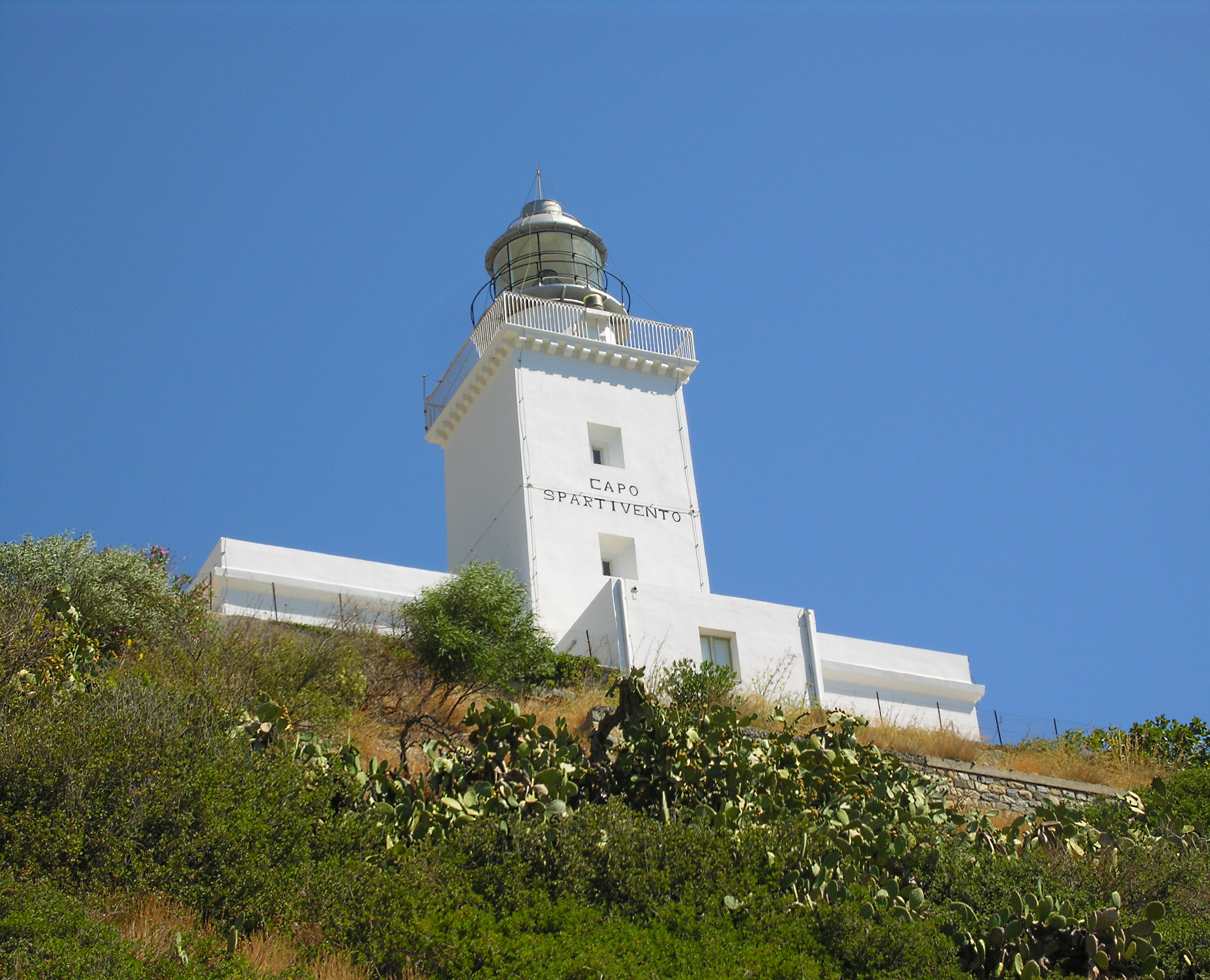 Calabria